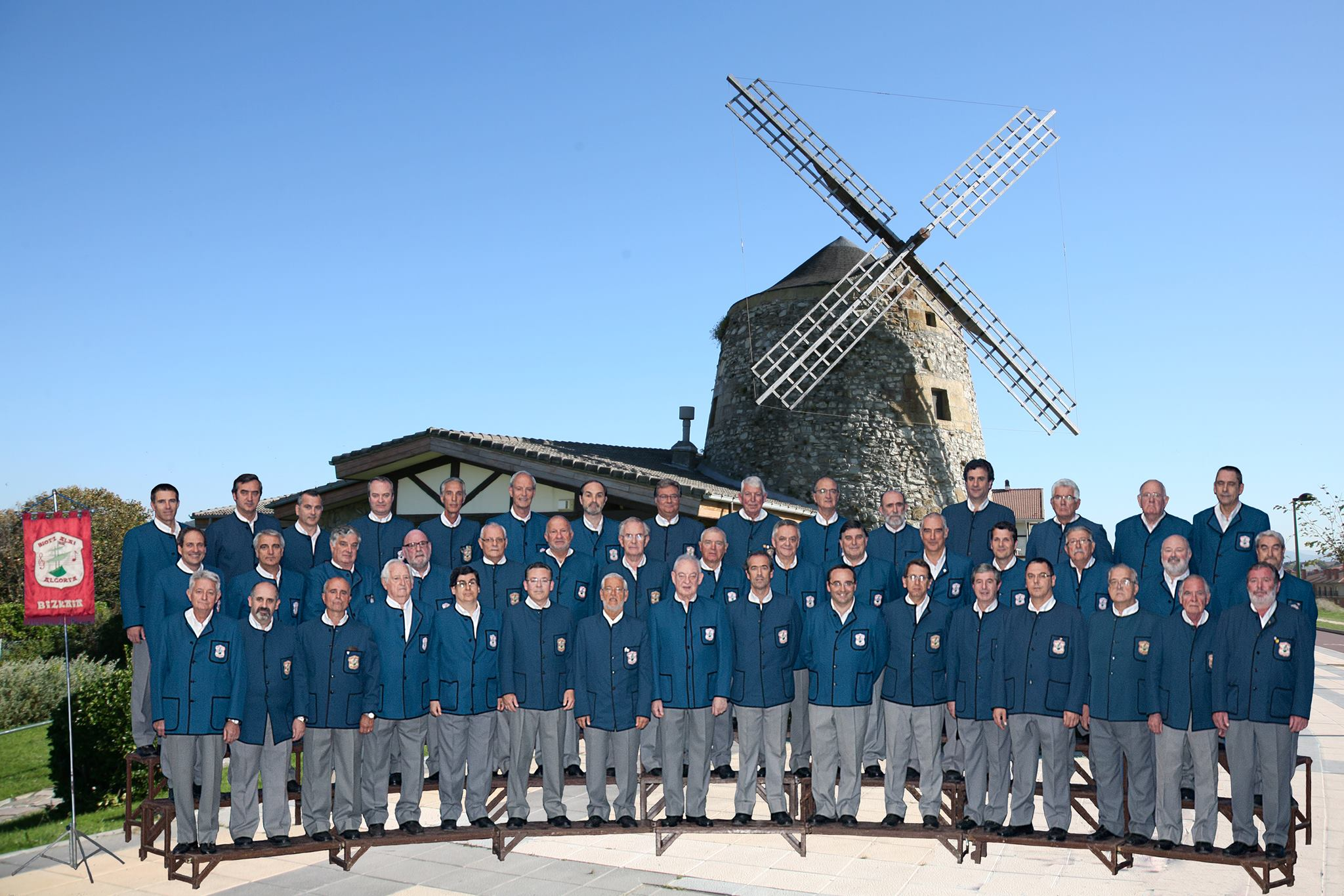 Foto del coro Biotz Alai 2015